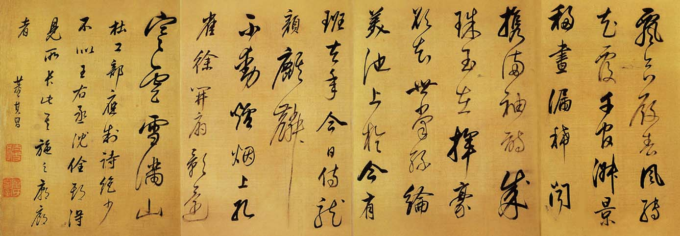 董其昌书杜甫《醉歌行》。